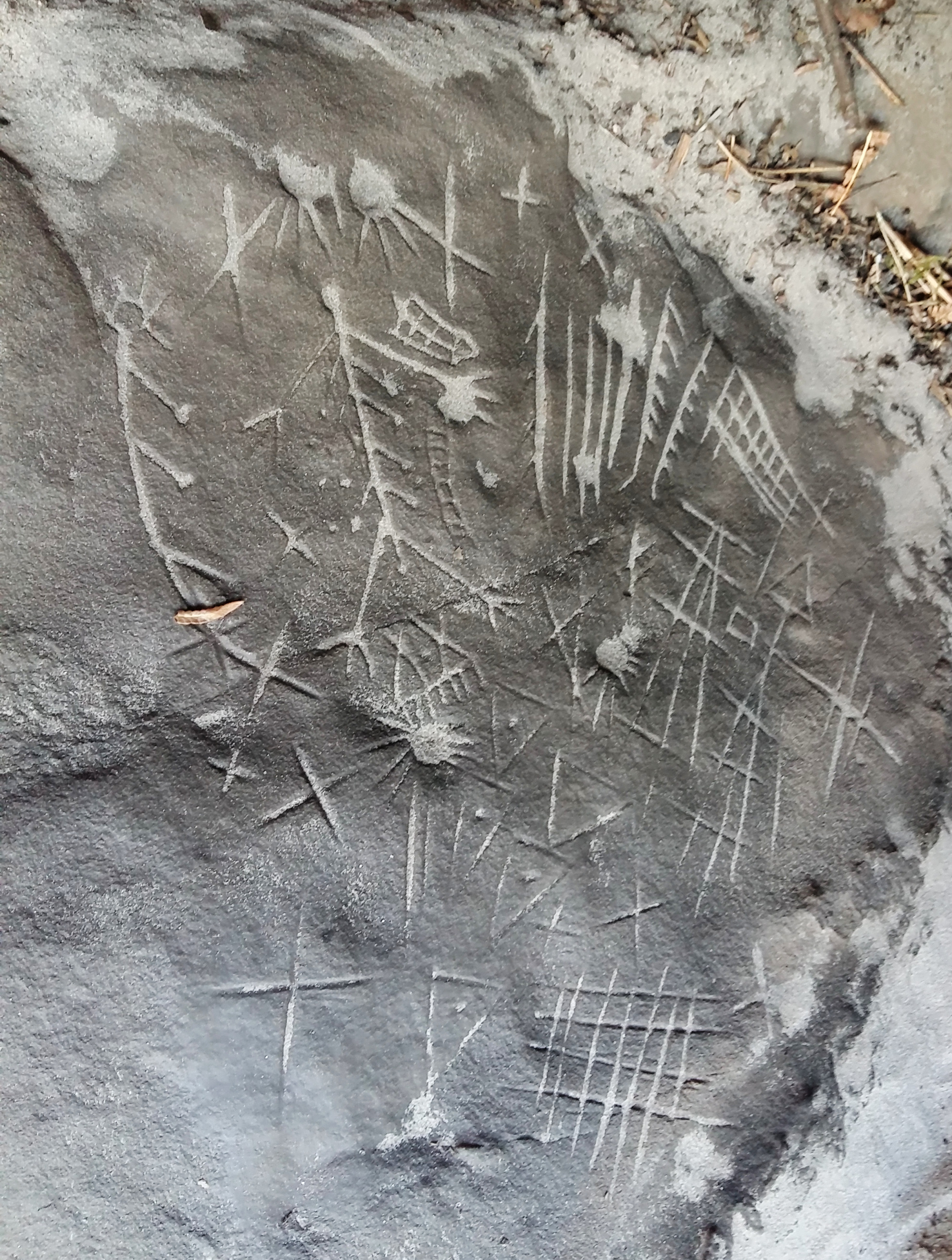 Gravure rupestre, probablement néolithique, typique du massif de Fontainebleau